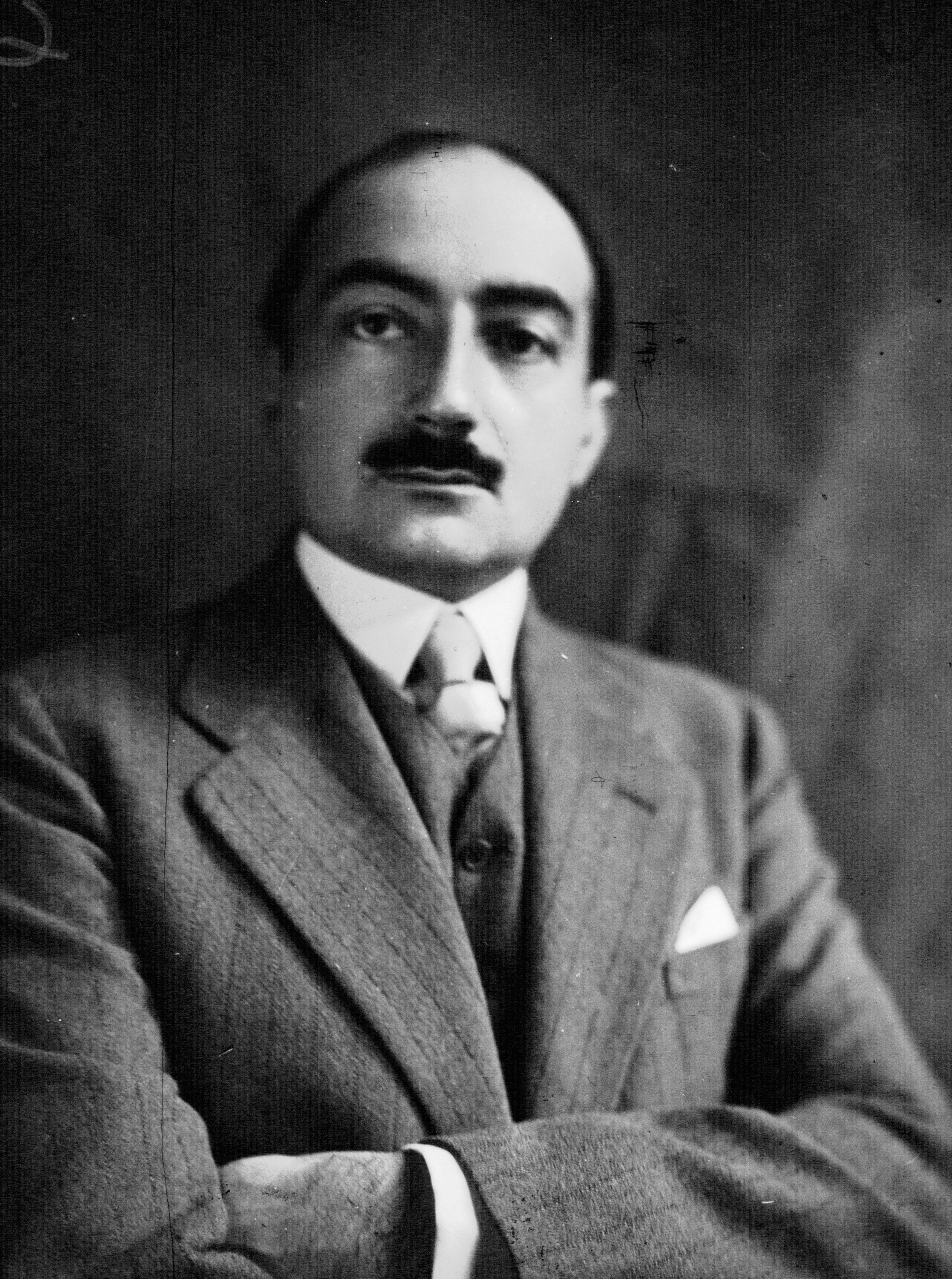 P. Bastid, député du Cantal : photographie de presse